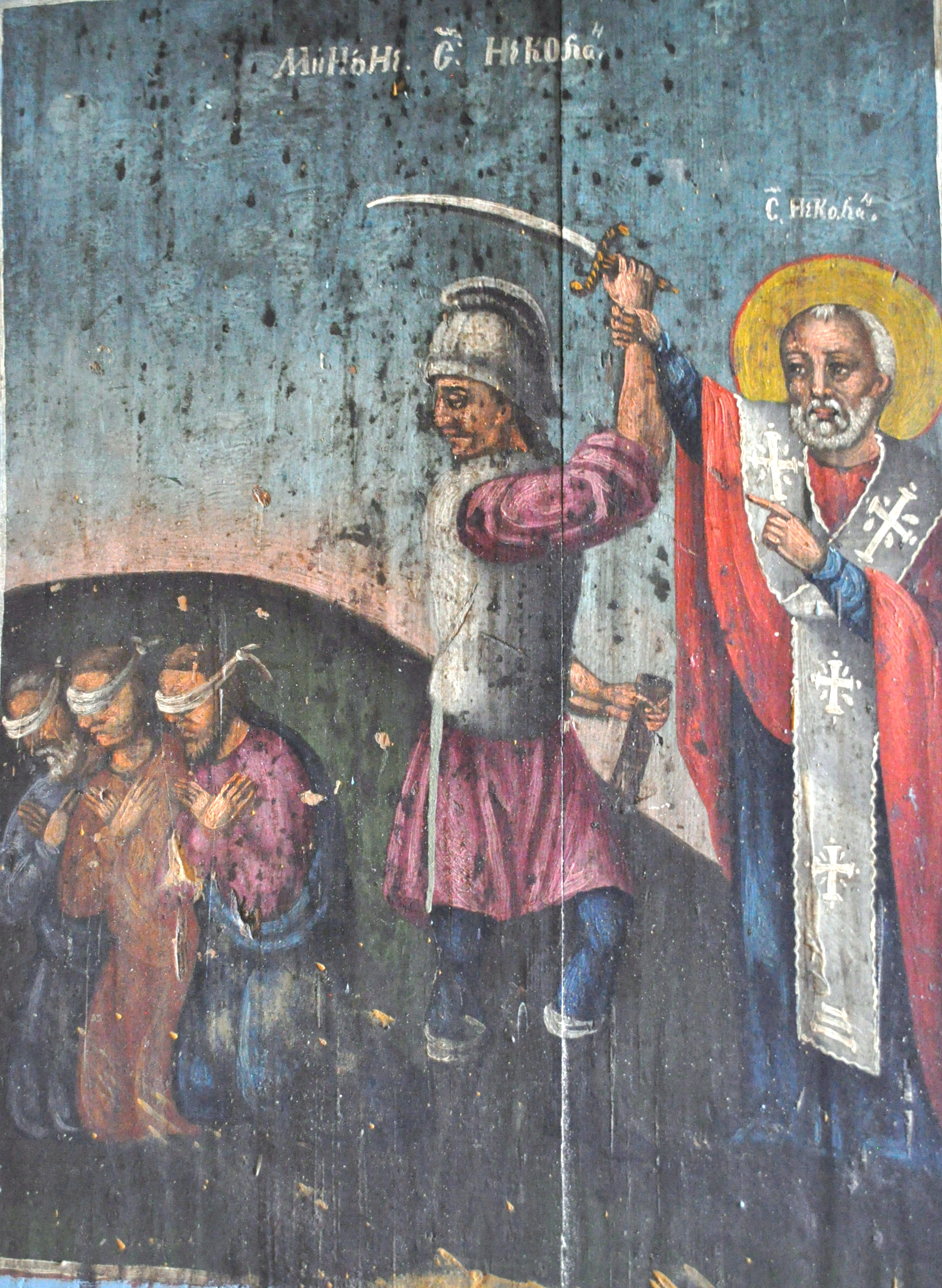 Biserica de lemn „Cuvioasa Paraschiva” din satul Valea Sării, județul Vrancea